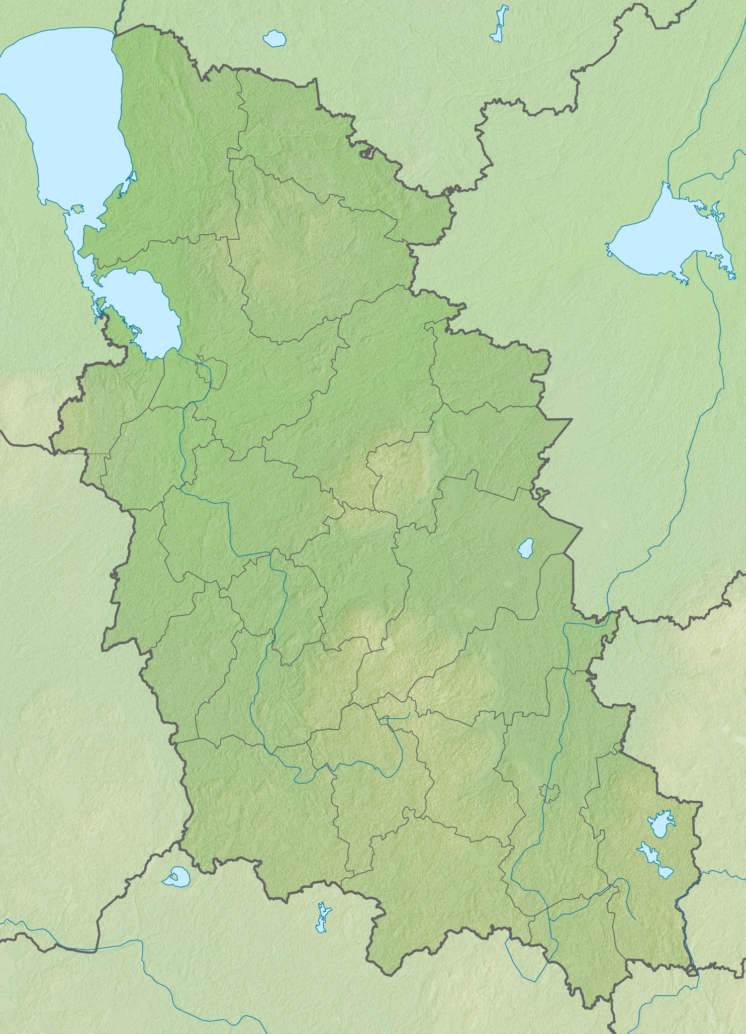 Физическая карта Псковской области Проекция — равноугольная. Стандартная параллель — 57°12′00″с.ш. Параметры шаблона (координаты краёв): |top = 59.1 |bottom = 55.5 |left = 27.0 |right = 31.8